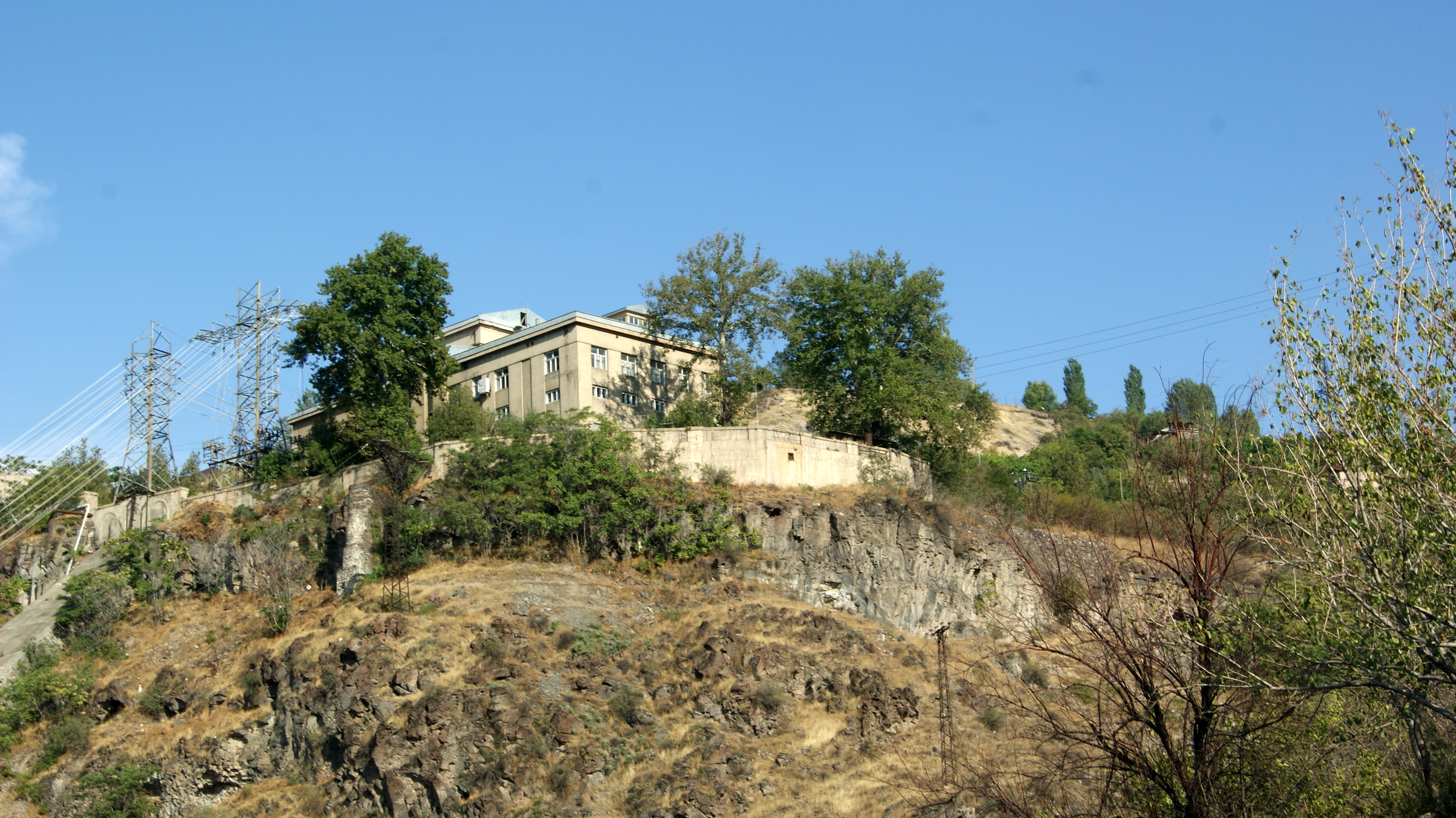 Հիդրոէլեկտրակայանի շենք. Քանաքեռի Հ. Տեր-Աստվածատրյանի անվան Հէկ-ը 3/5